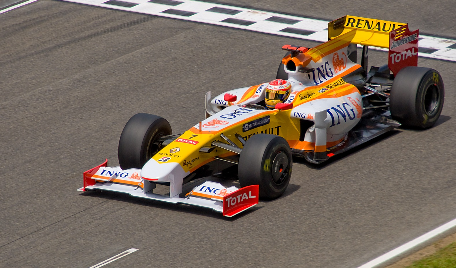 Nikon D90 + Sigma 18-200 DC OS HSM 1/1600s - F/9 - 200mm - ISO640